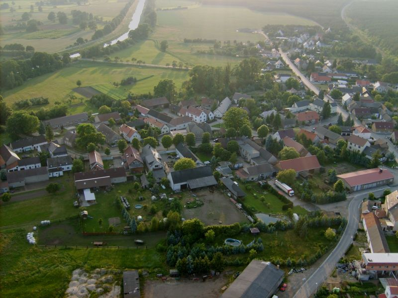 Dorfmitte von Haida